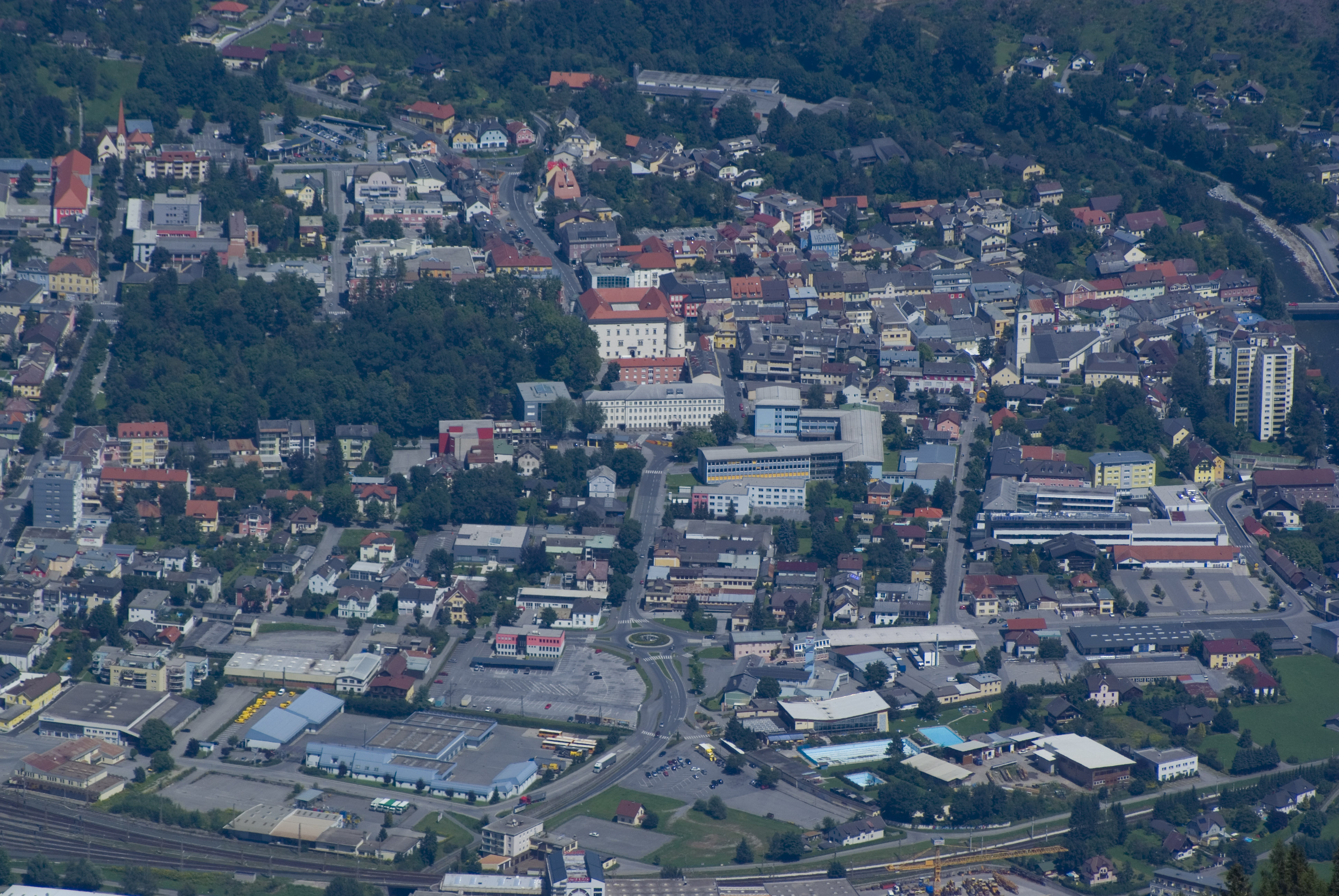 Spittal an der Drau vom Goldeck aus gesehen